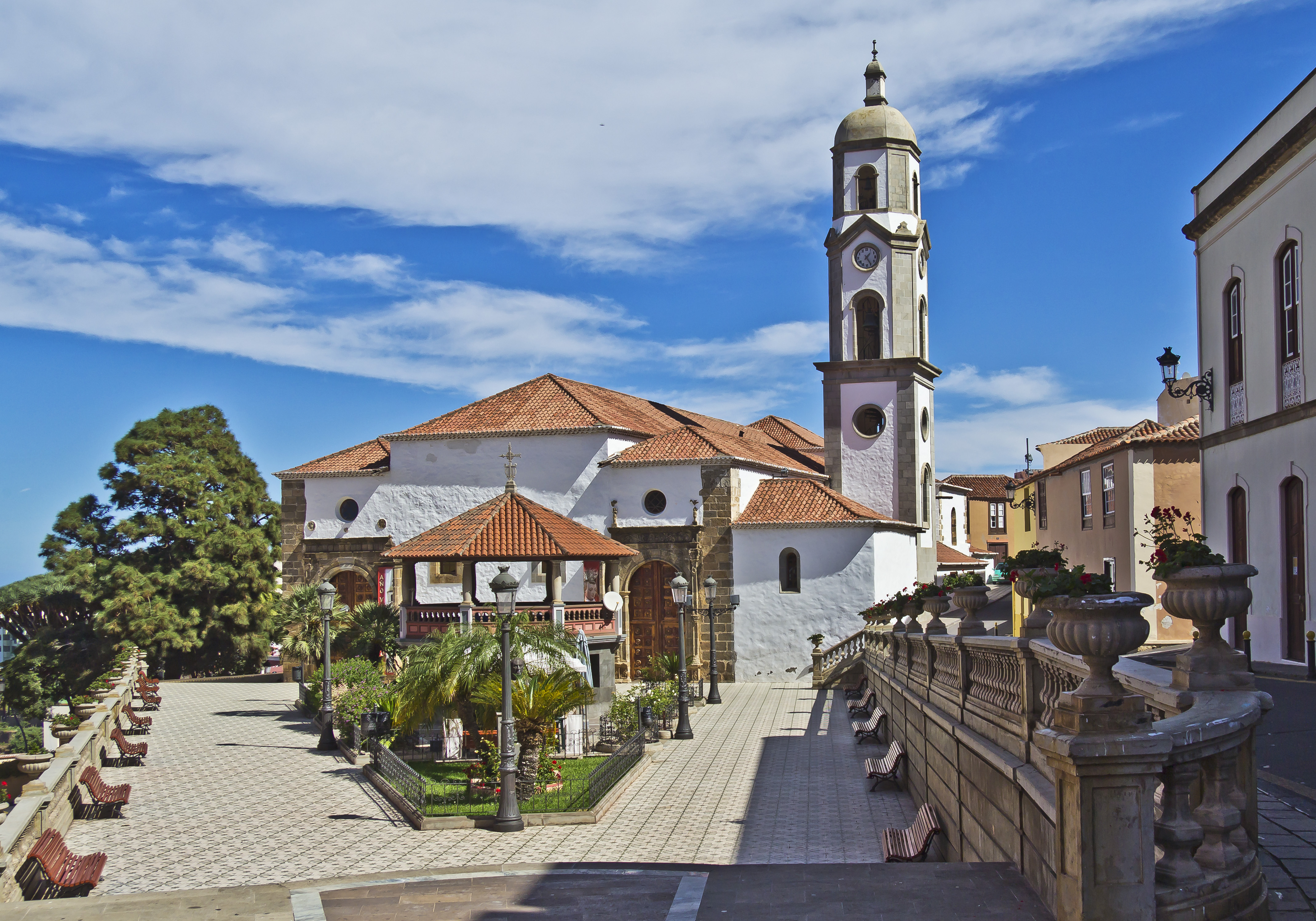 Kirche Nuestra Señora de la Concepción (Los Realejos)